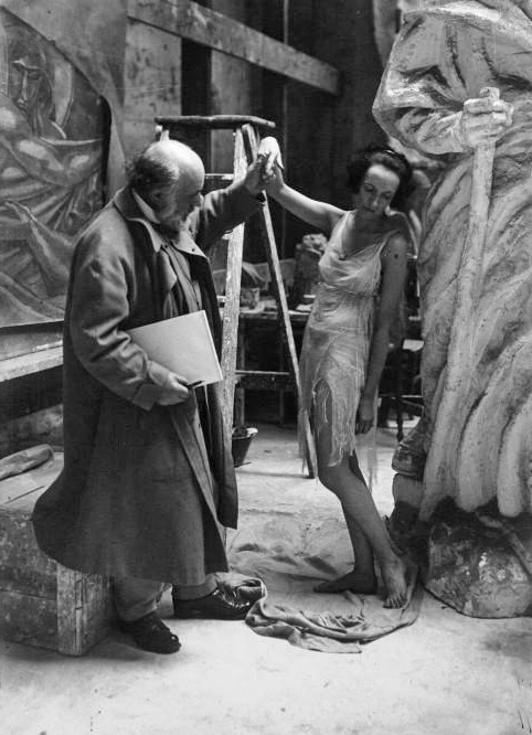 Le sculpteur Bourdelle et la danseuse américaine Miss Grace Christie : photographie de presse